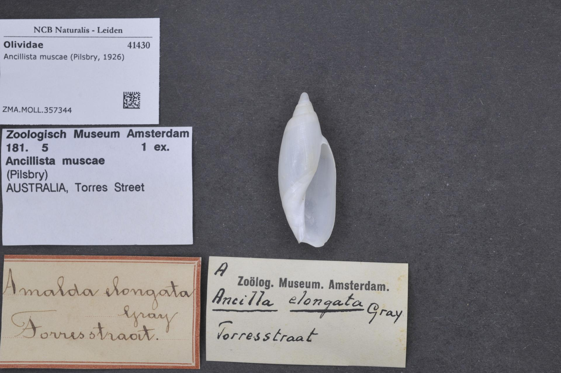 Ancillista muscae (Pilsbry, 1926)